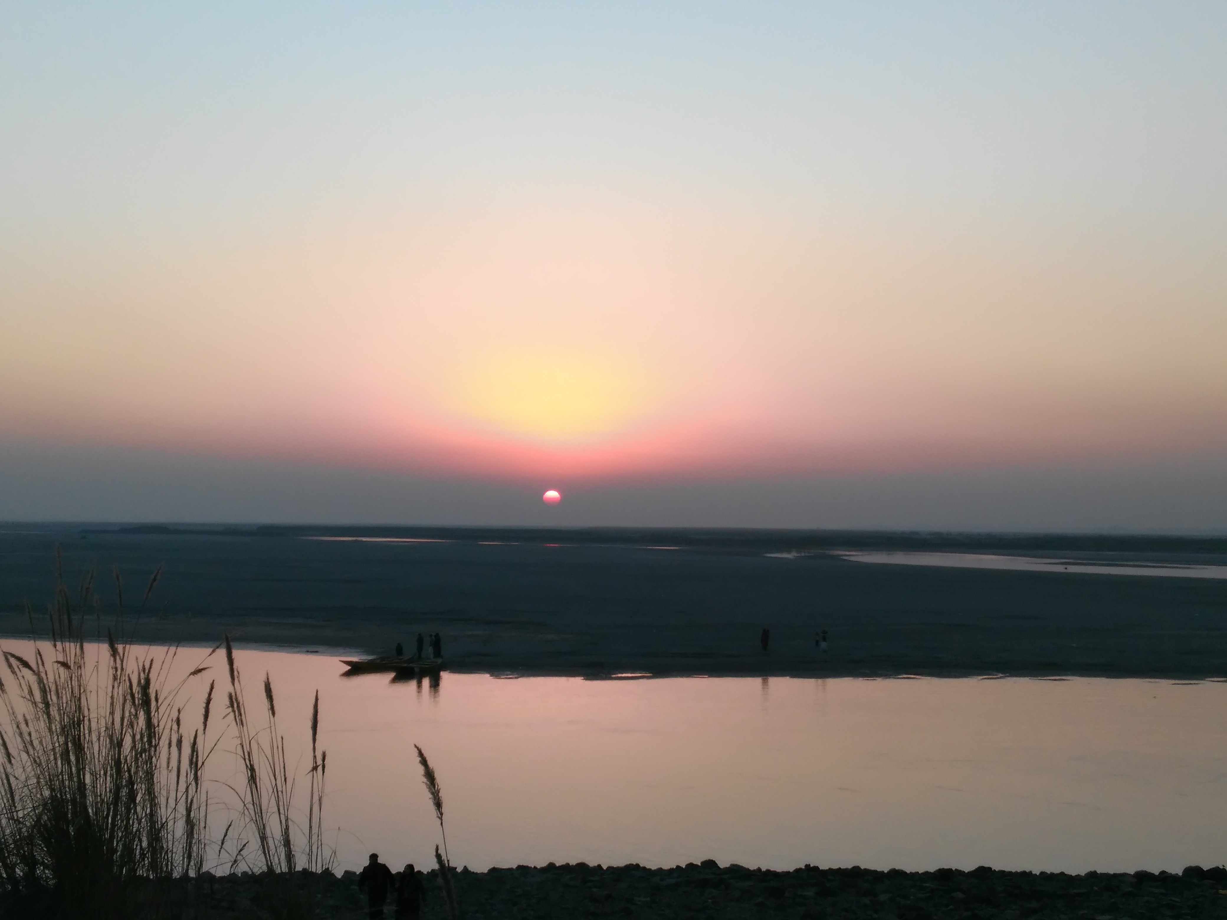 Sunset at Head Marala